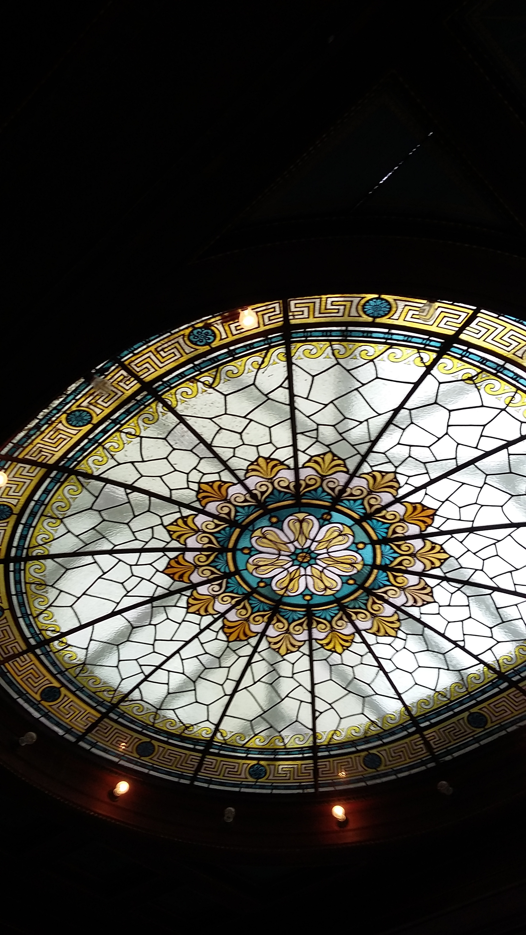 Villa Schmits Wintergarten Wuppertal